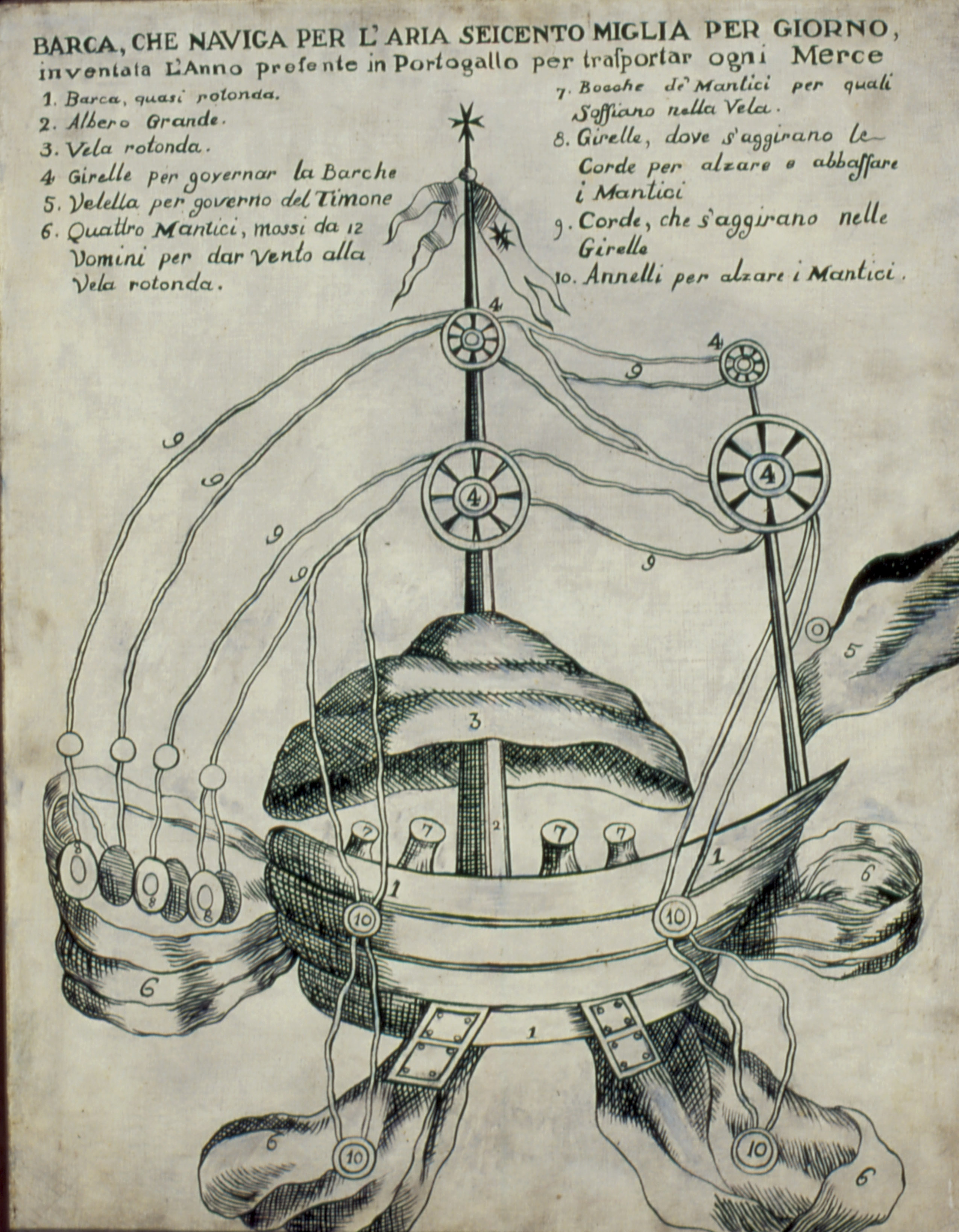 Obra que integra o acervo do Museu Paulista da USP. Coleção Fundo Museu Paulista - FMP